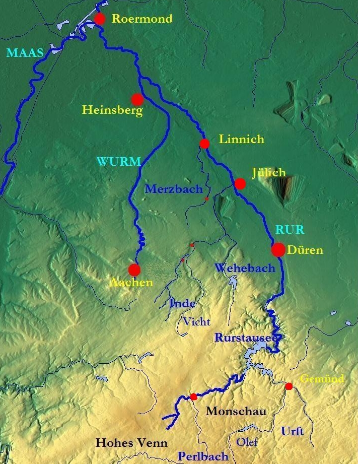 Verlauf der Rur und seine Nebenflüsse